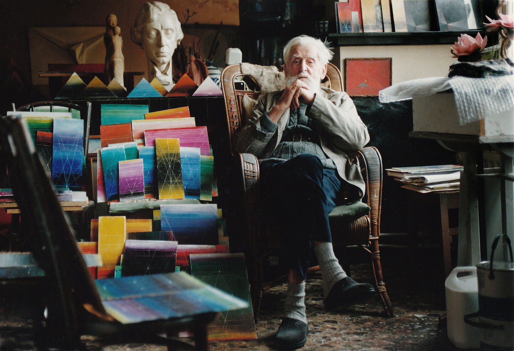 Felix De Boeck, Vlaams schilder en landbouwer